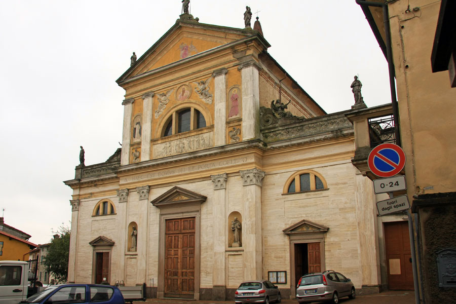 Casteggio, facciata della collegiata di San Pietro